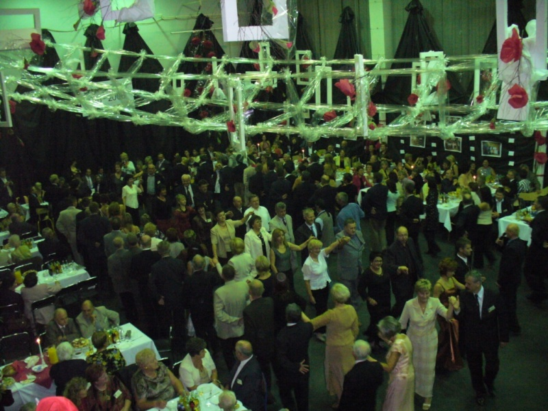 Uroczysty Zjazd Absolwentów z okazji osiemdziesięciolecia Liceum Ogólnokształcącego im. Hugona Kołłątaja w Jordanowie